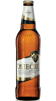 Osječko svijetlo lager pivo.